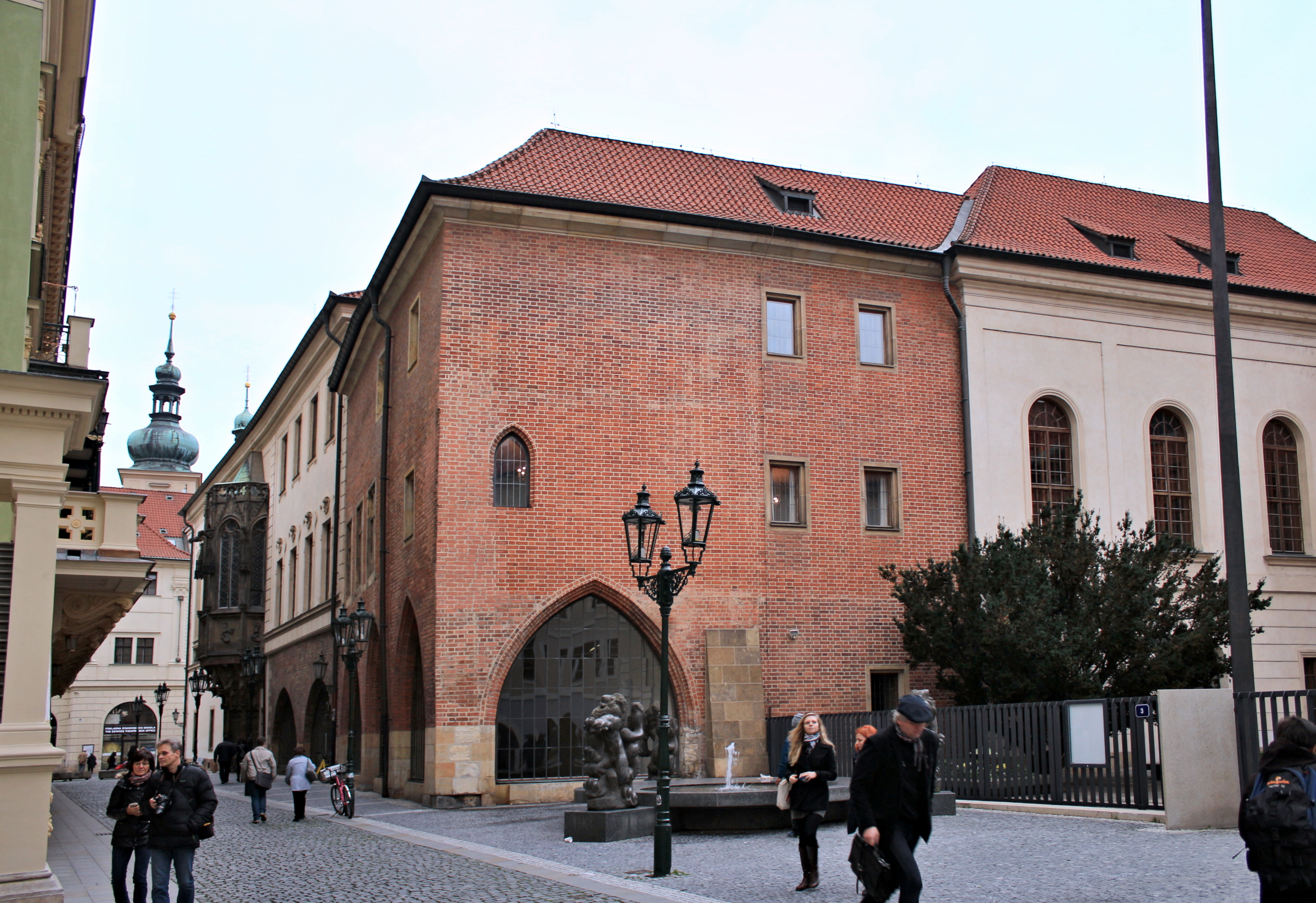 Praha, Karolinum